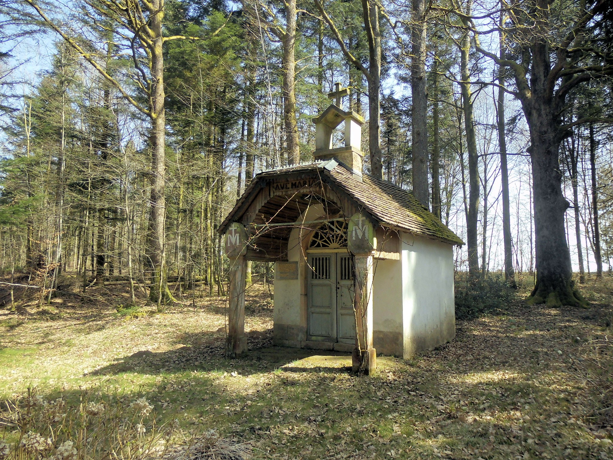 La chapelle de la Vierge, dite chapelle de la Vierge-de-la-Croix, dite aussi chapelle Barrault d'Aillevillers